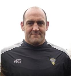 Mario Ledesma lors d'un entrainement avec l'ASM Clermont Auvergne